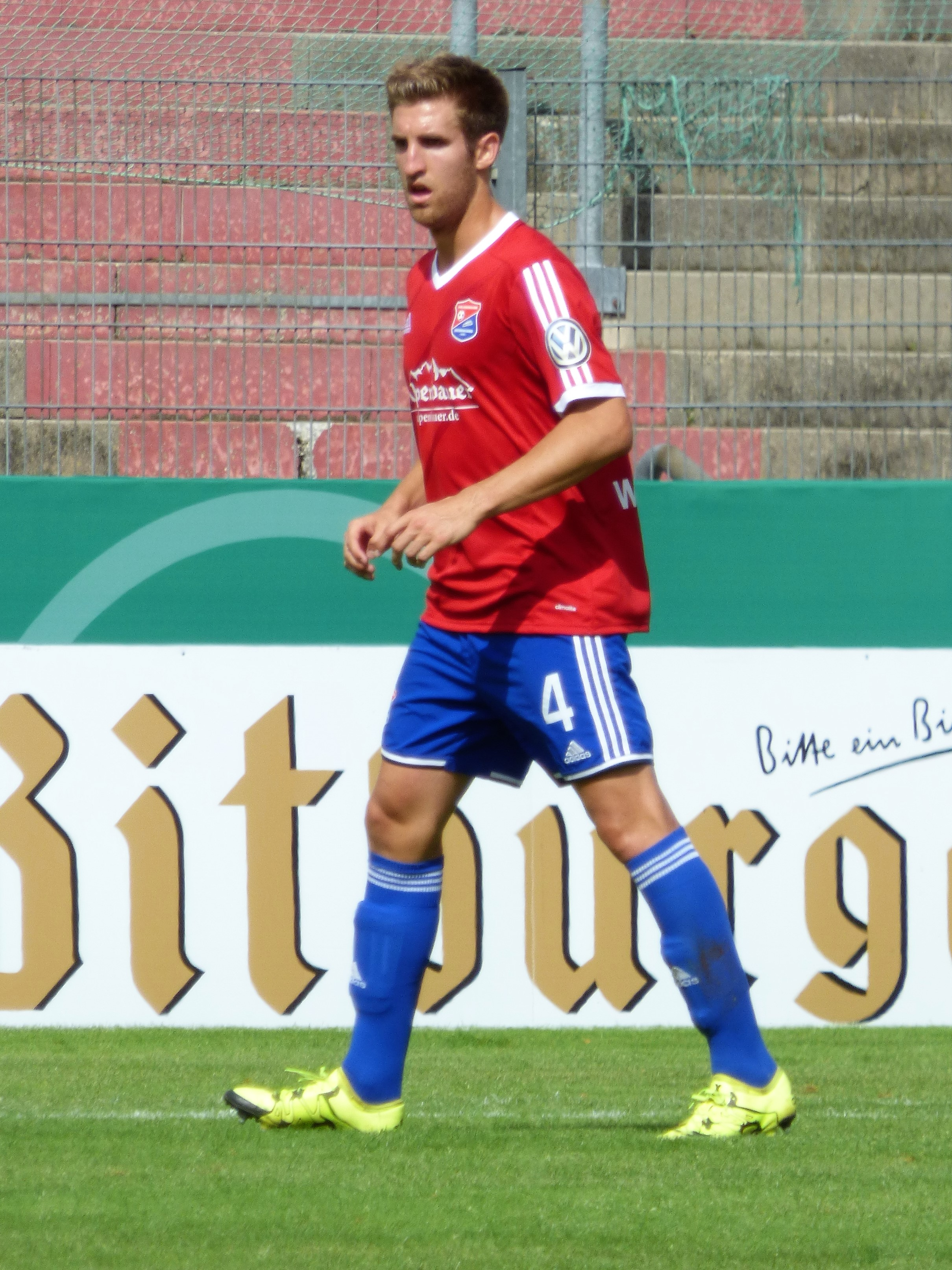 Winkler, Alexander Unterhaching